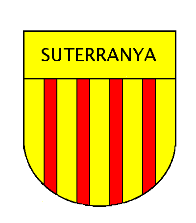 Antic escult municipal de Suterranya (Tremp, Pallars Jussà)